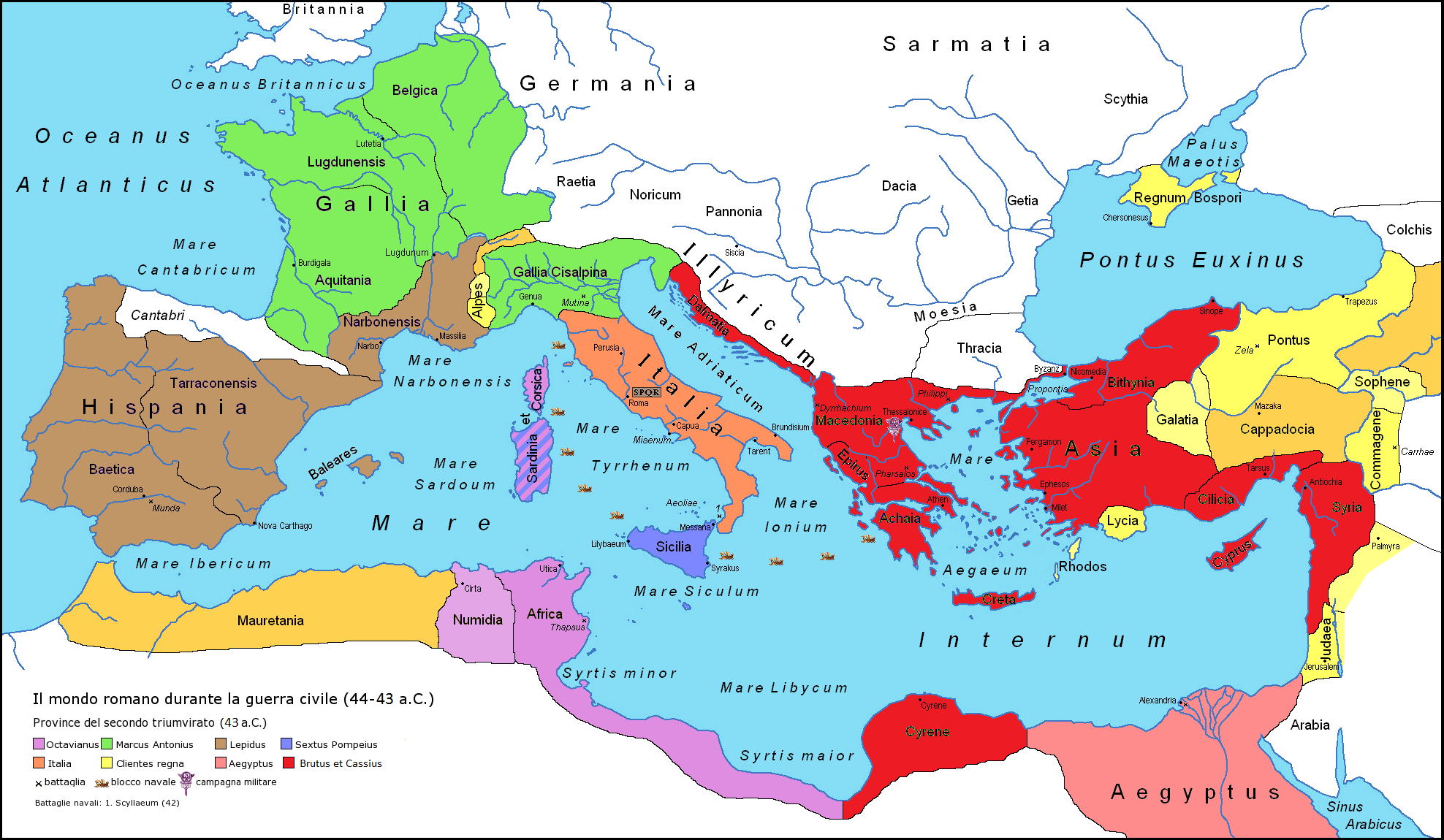 Adaptée de File:Roman-Empire-39BC-sm.png. Version provisoire.